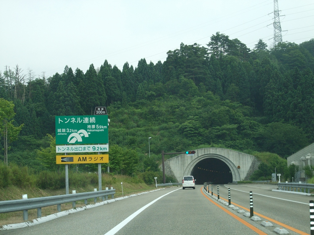 東海北陸自動車道 城端トンネル付近（岐阜方面を撮影） （城端SA～五箇山IC間）